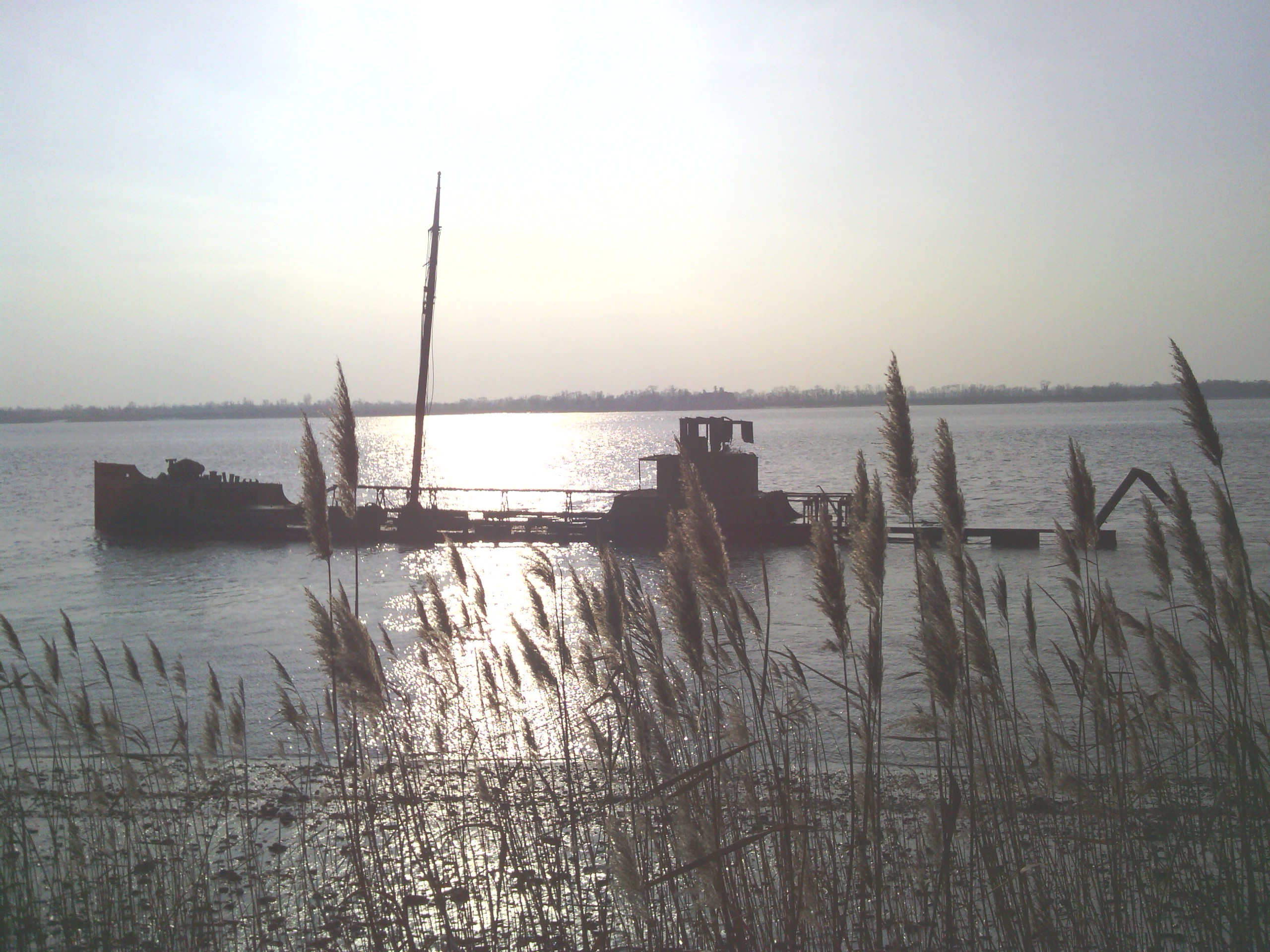 Le Frisco à Gauriac (France) sur la rive droite de l'estuaire de la Gironde, dit le bateau qui coule, pétrolier italien sabordé par la marine allemande le 26 août 1944.